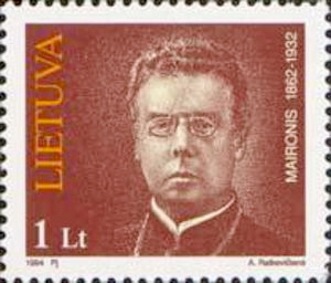 Maironis